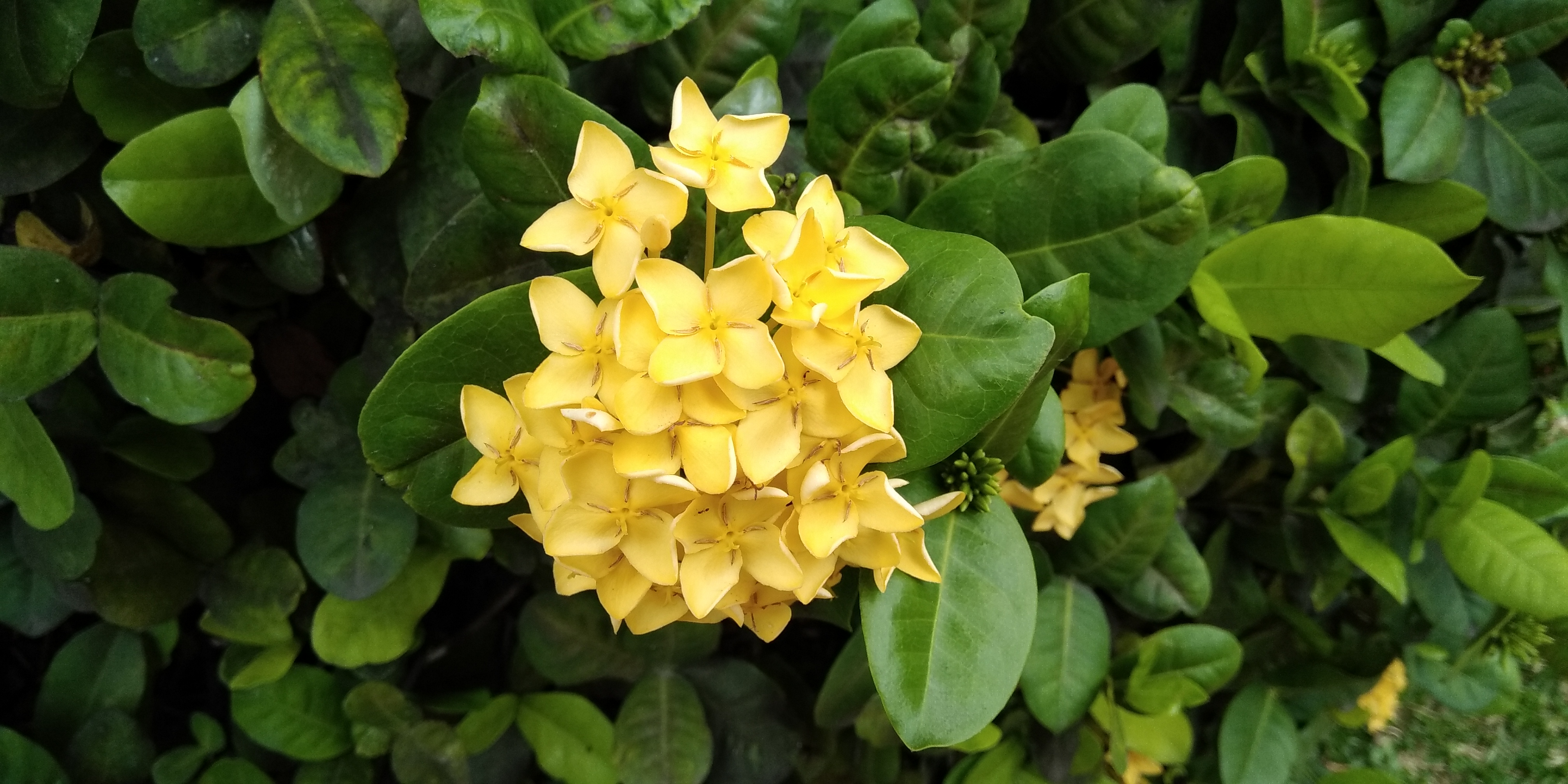 Ixora casei, planté dans le parc de l' Habitation Clément en Martinique.